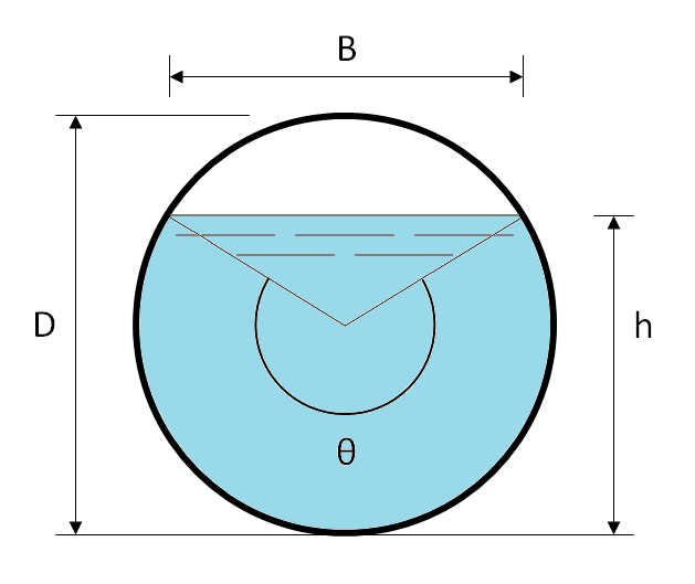 Éléments géométriques pour une section de canal circulaire